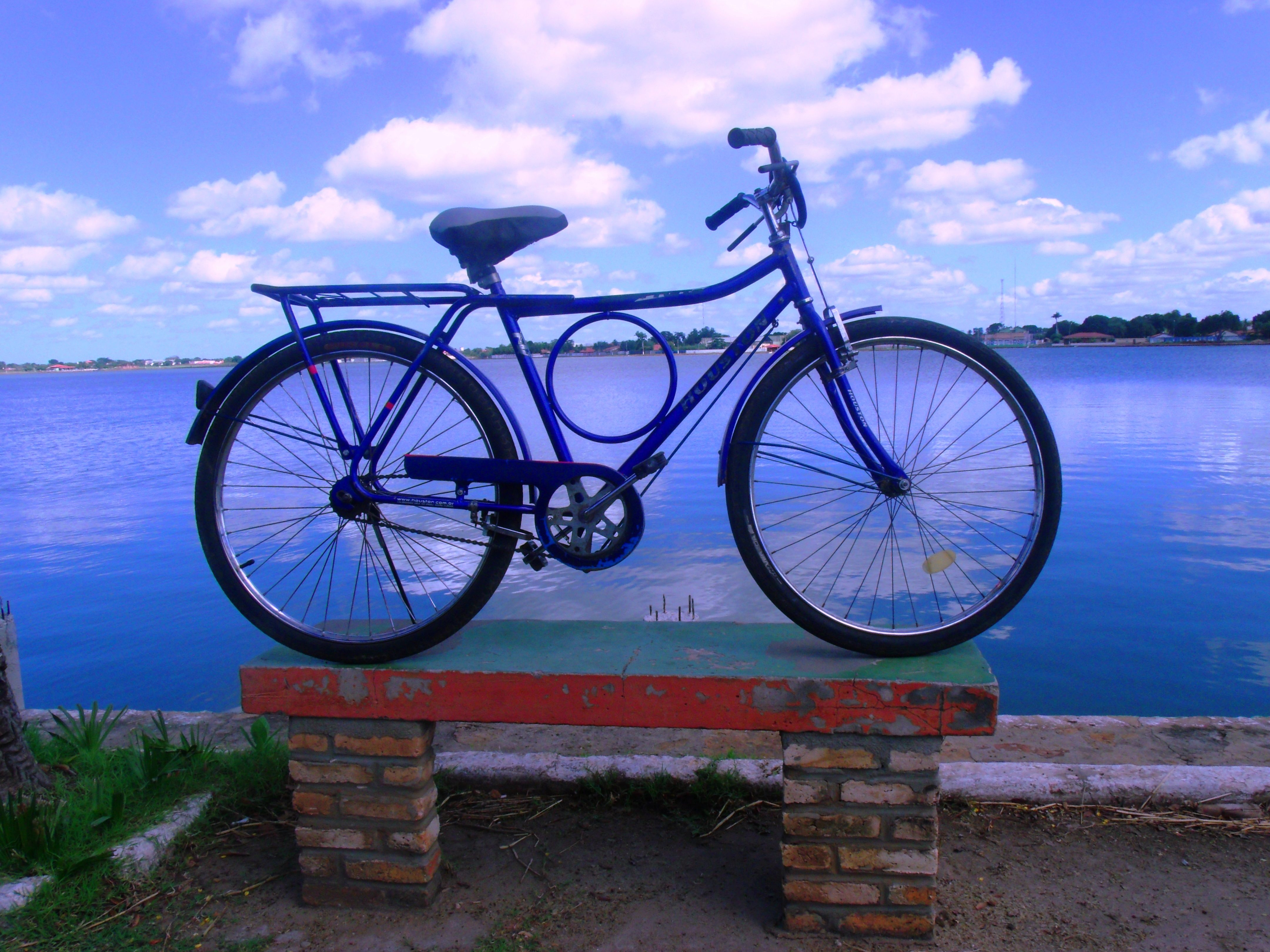 Imagem de um modelo super forte, da Houston Bike, uma fabricante de bicicleta brasileira sedeada em Teresina, no Piauí.